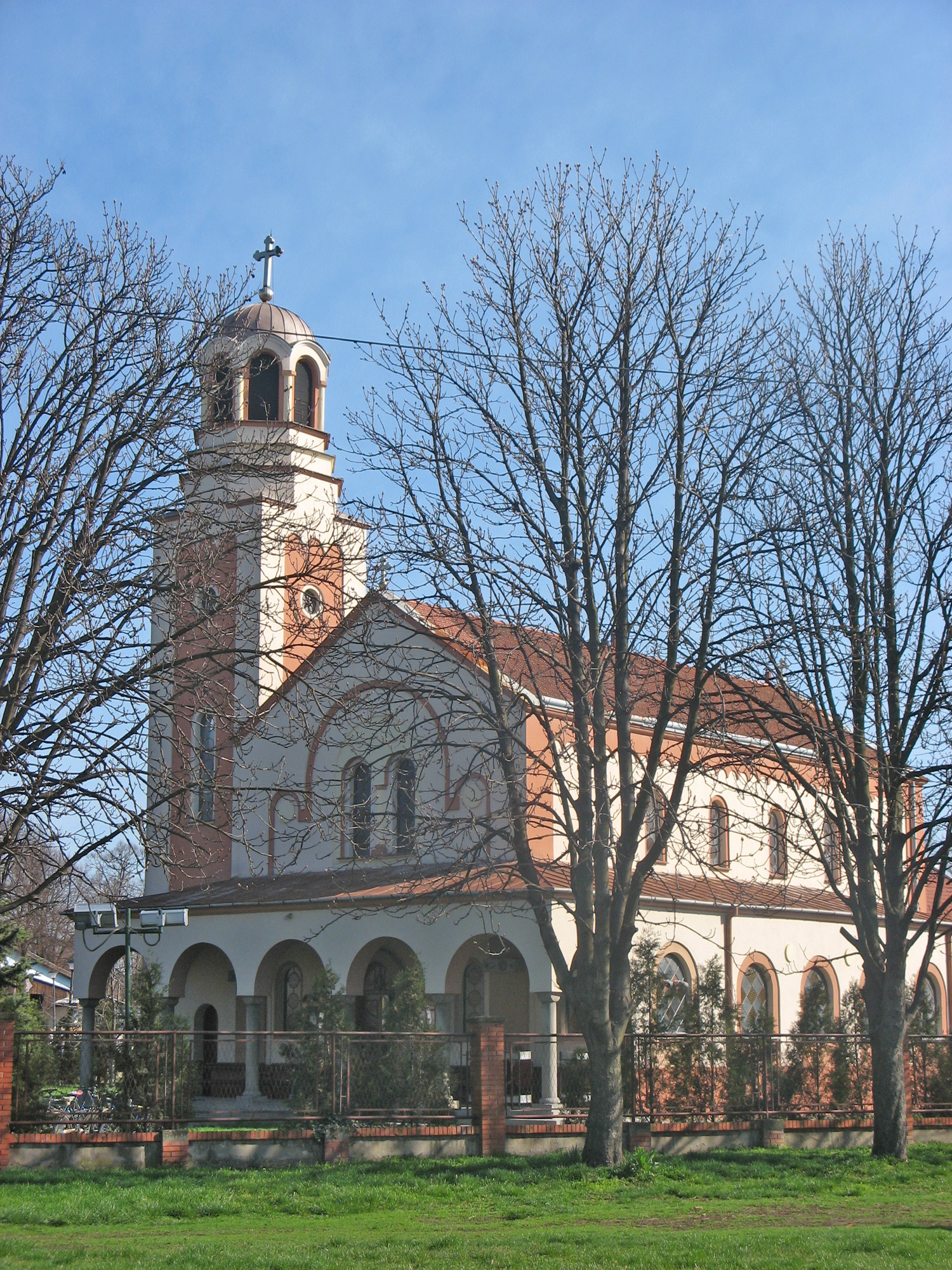 Szerb Pravoszláv - Ortodox Templom, Topolya. Alapkőletétel 1932. október 16-a. Használatra átadva 1940-ben